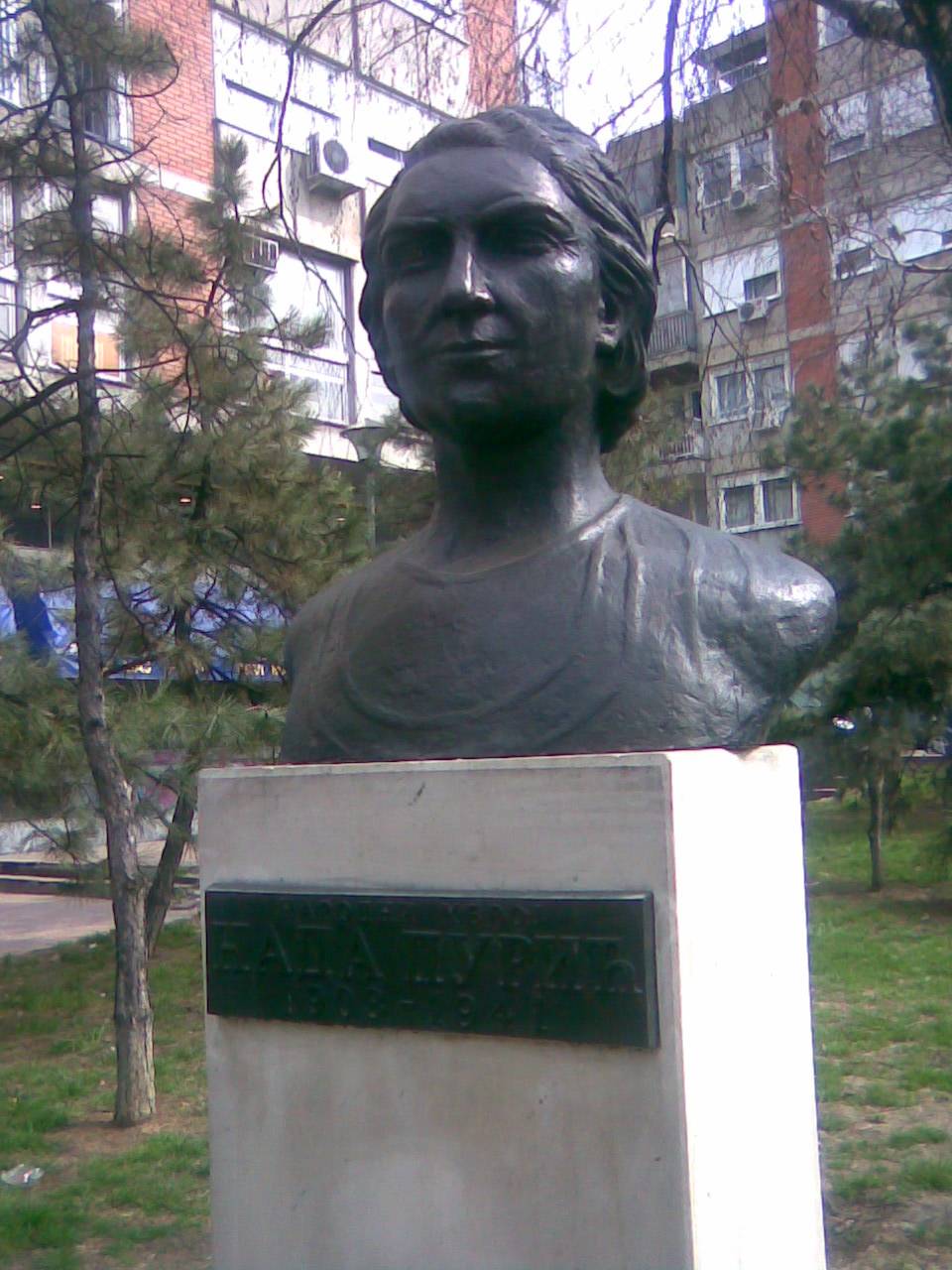 Spomenik Nadi Puric, Vracar Beograd